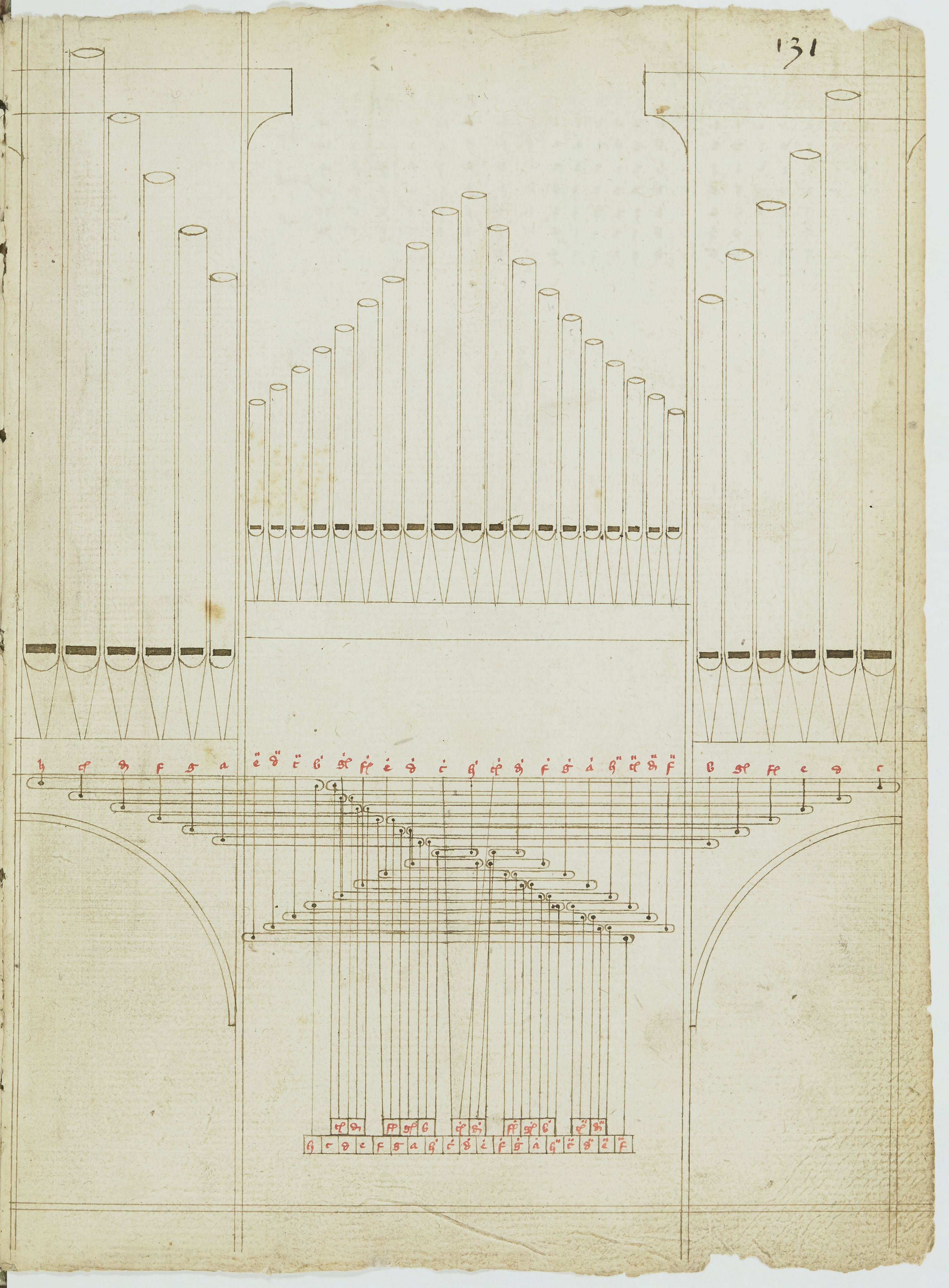 Tuyaux d'orgue.